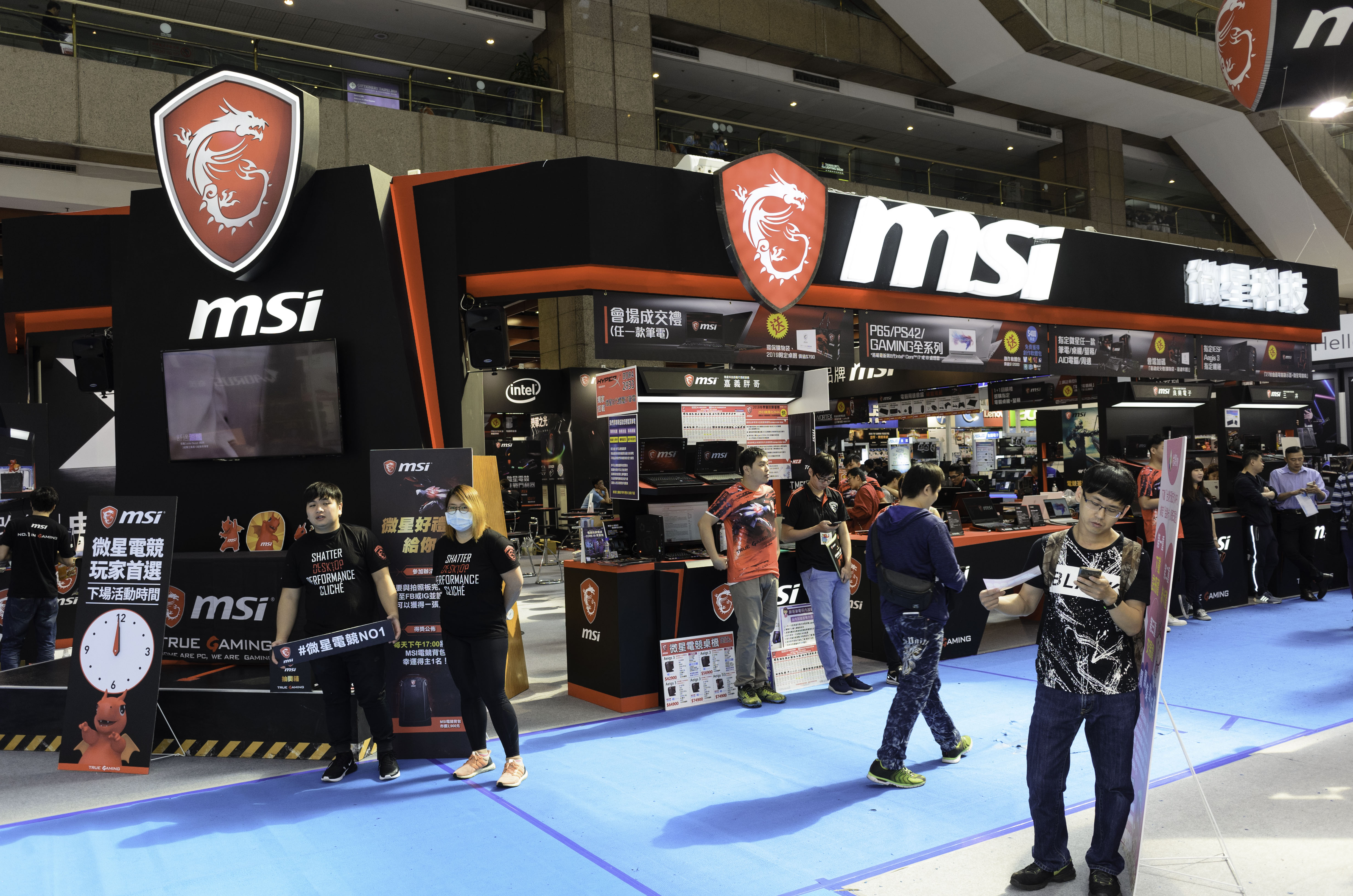 中文（台灣）: 2018年台北資訊月，微星科技攤位。